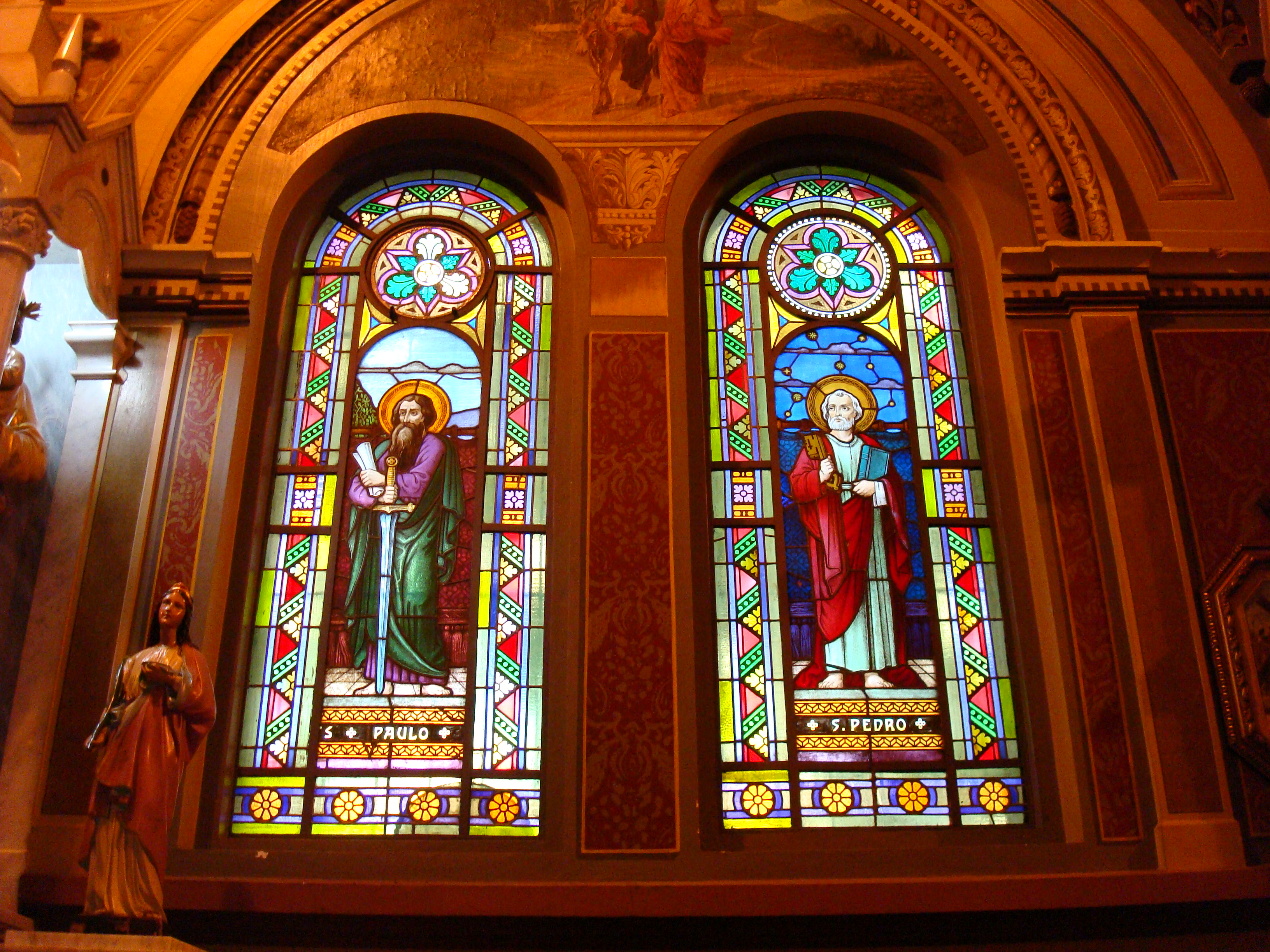 Vitral na Igreja Catedral de Ribeirão Pretro